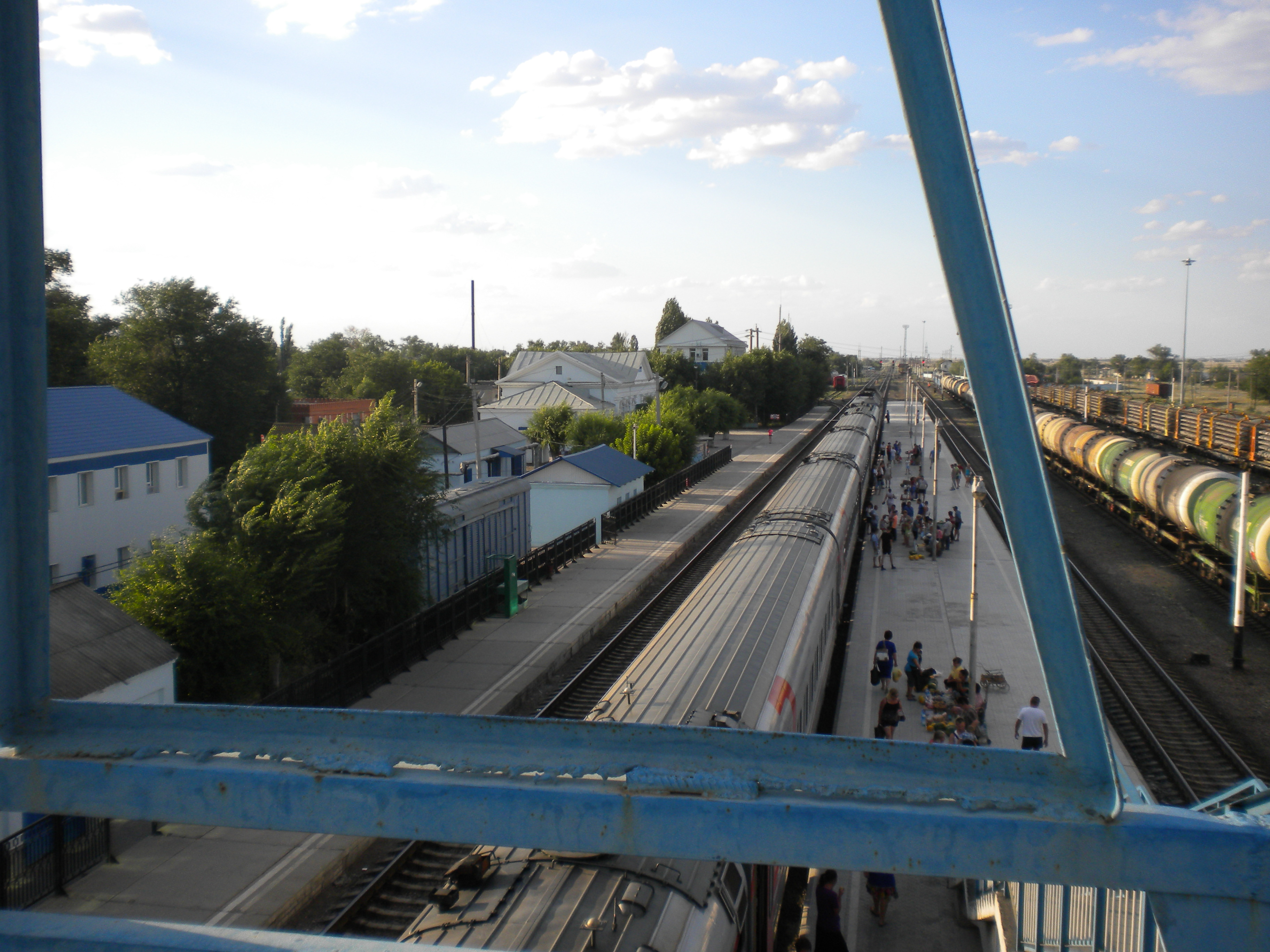 Верхний Баскунчак. Вид на станцию со стороны пешеходного моста.